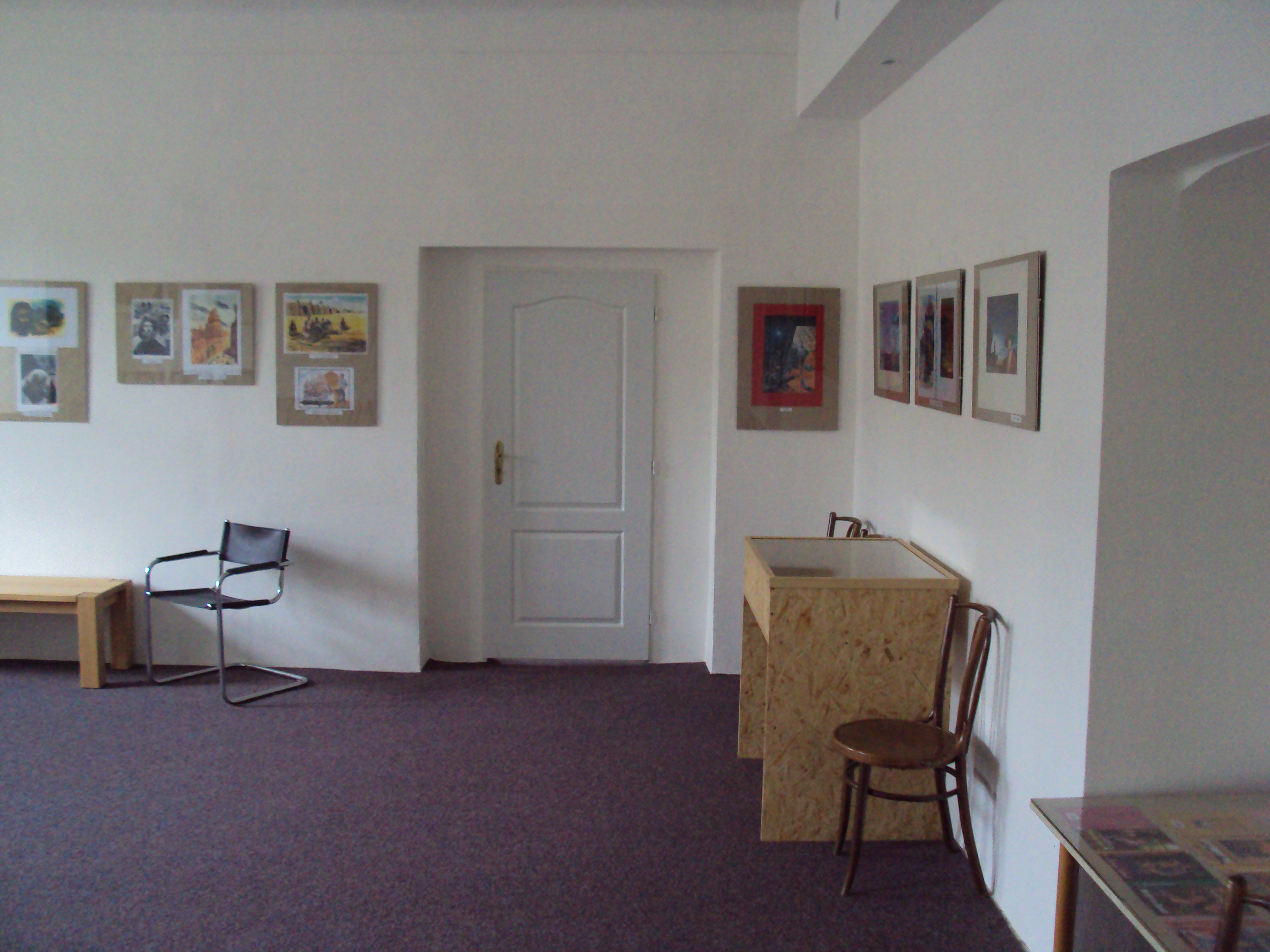 Galérie v 1. patře Eduard Held musea na zákupském náměstí